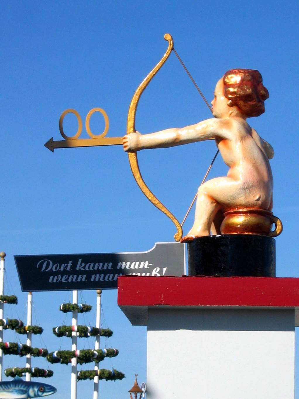 München, Oktoberfest